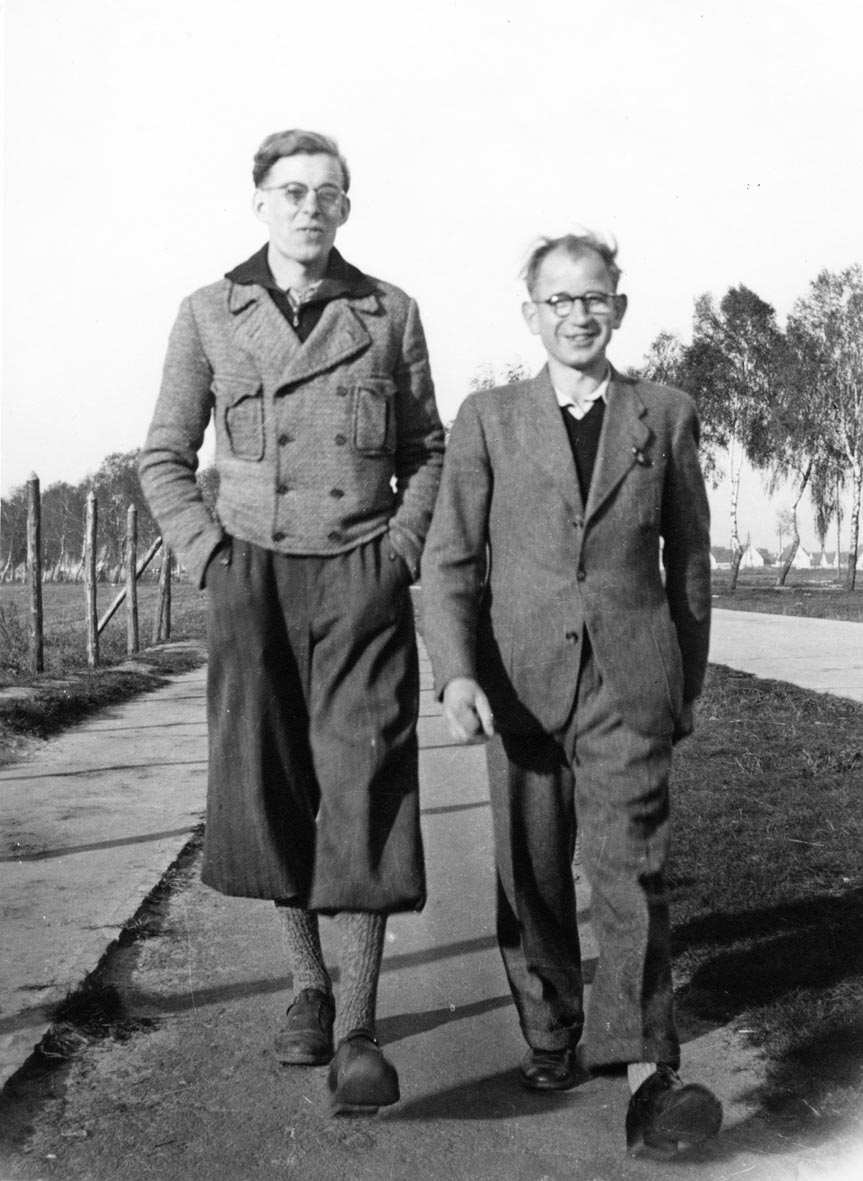 Hans Coppi (links) und Fritz Gabbe in Velten